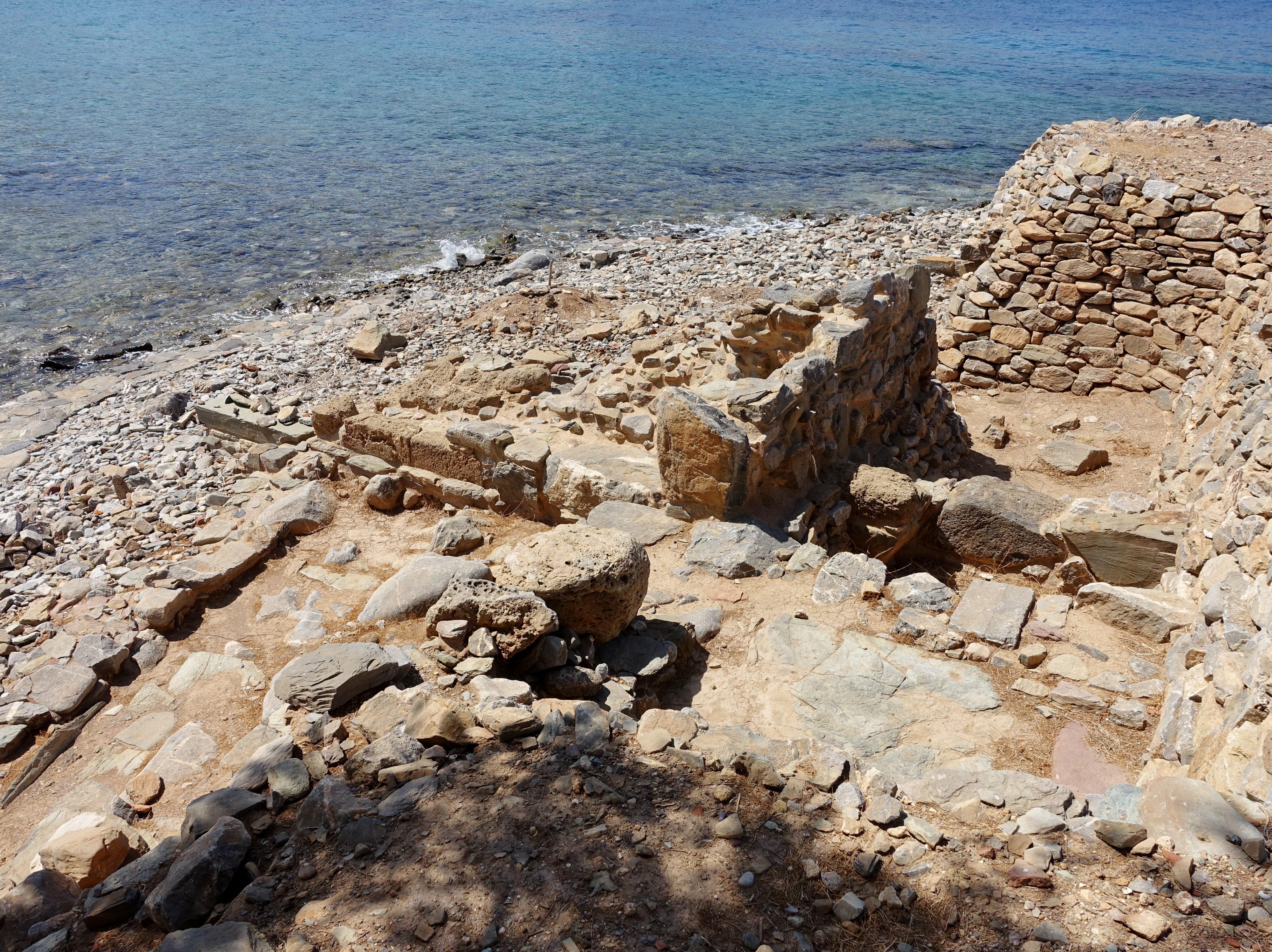 Ausgrabungsstätte auf der Insel Agios Nikolaos (Άγιος Νικόλαος) vor Mochlos (Μόχλος), Kreta, Griechenland